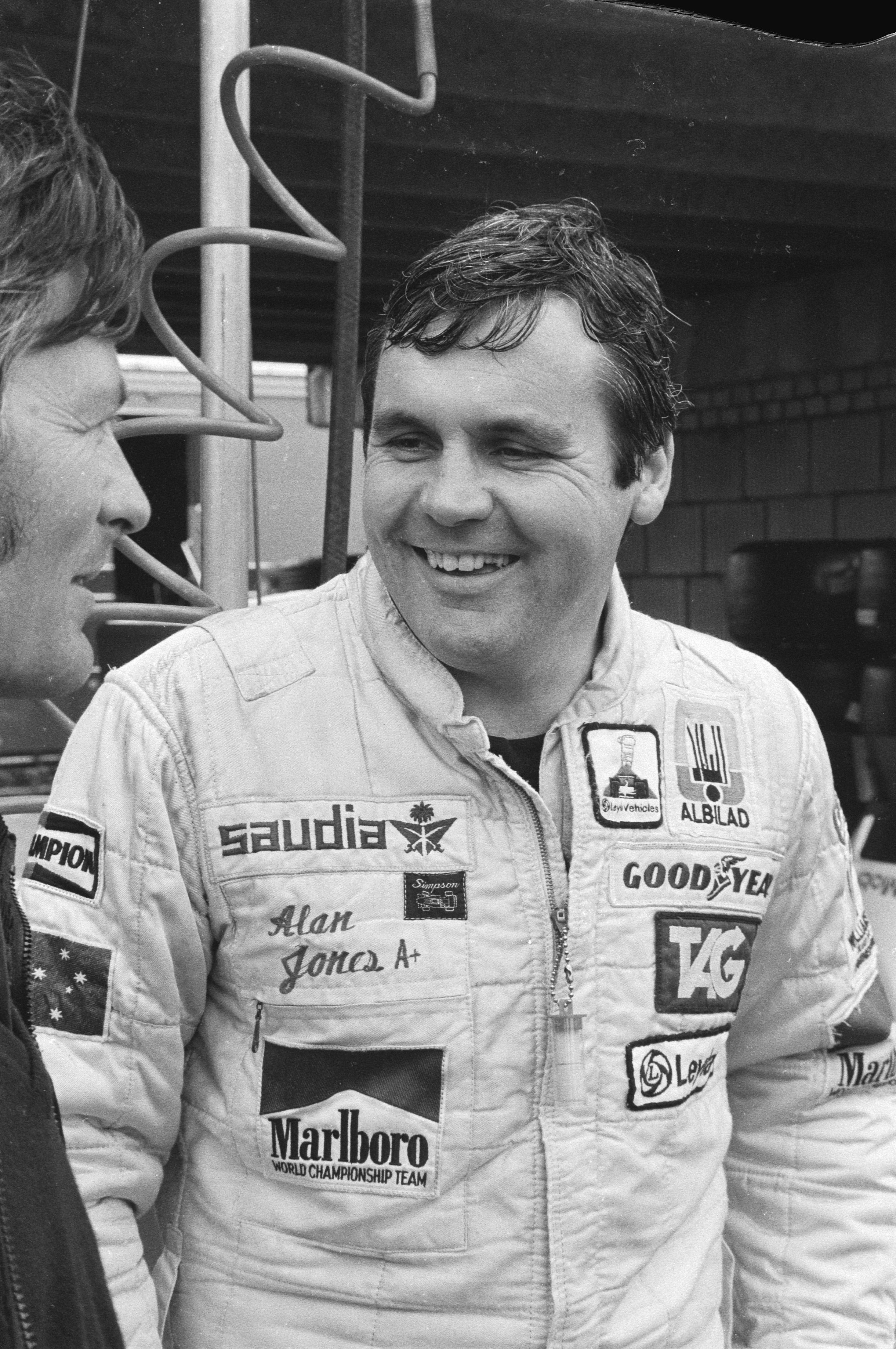 Alan Jones lors des essais du Grand Prix des Pays-Bas 1980